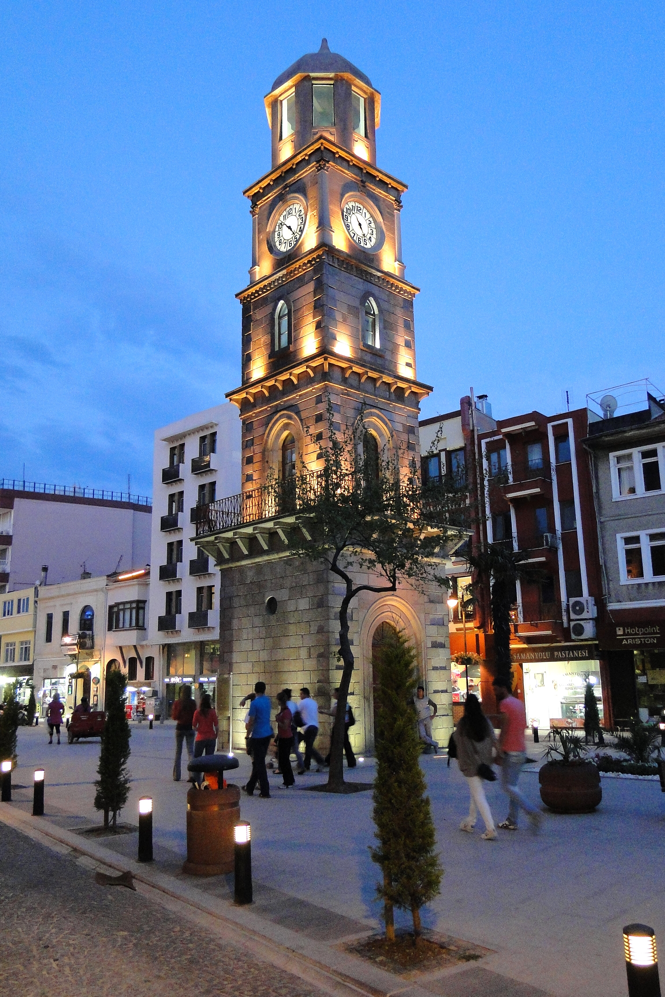 Clocktower at Dusk - Canakkale - Dardanelles - Turkey